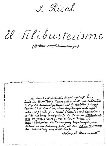 Initium autographi.